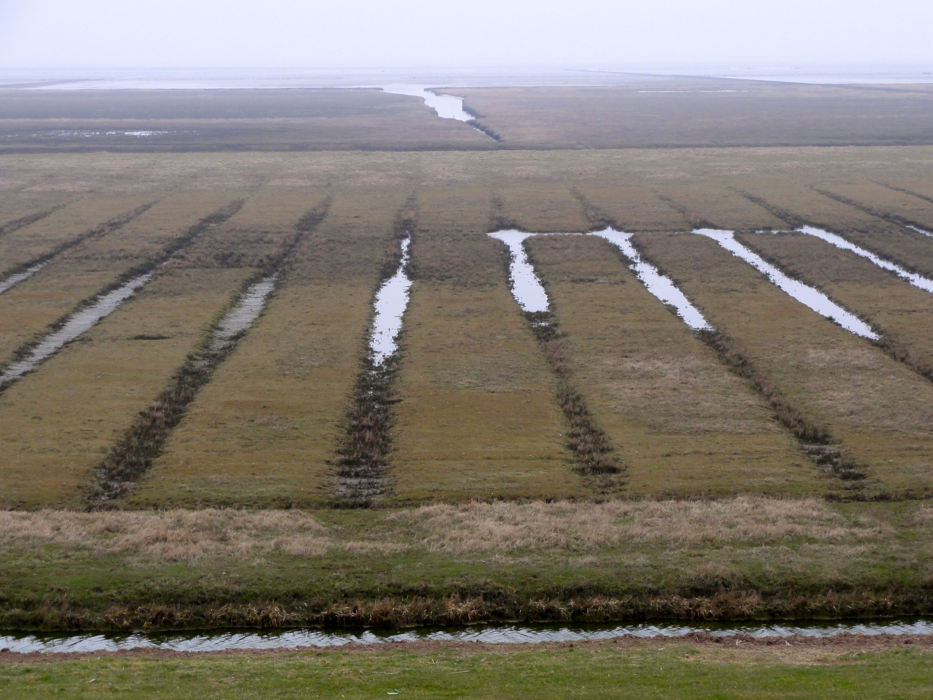 Kwelder in de Waddenzee ten noorden van de Noordpolder